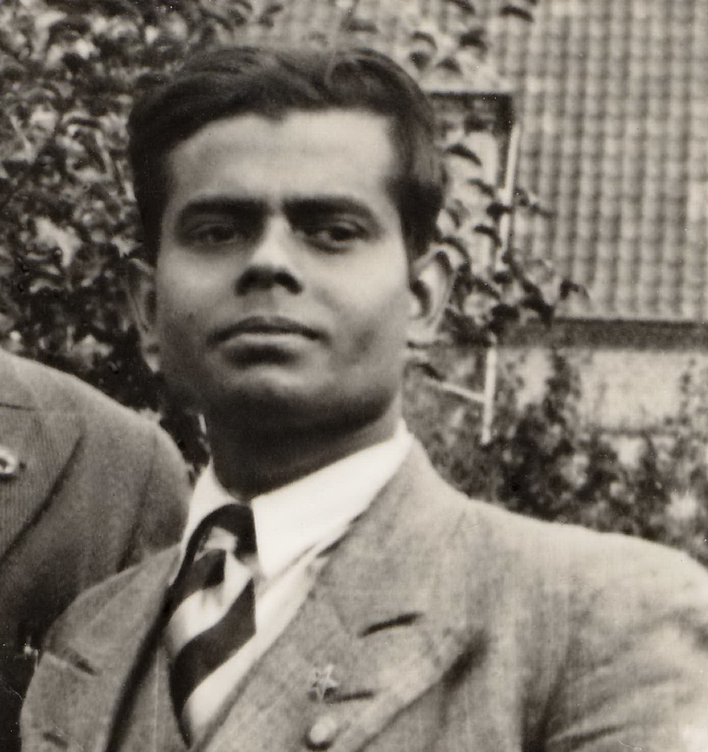 Portreto de Sinha Laksmiswar